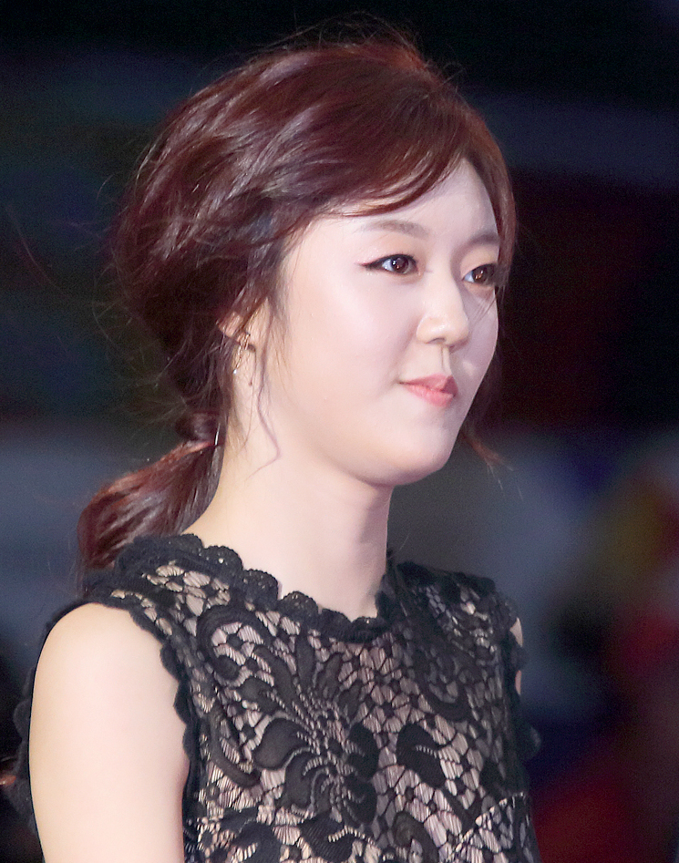 151001 부산국제영화제 개막식 레드카펫